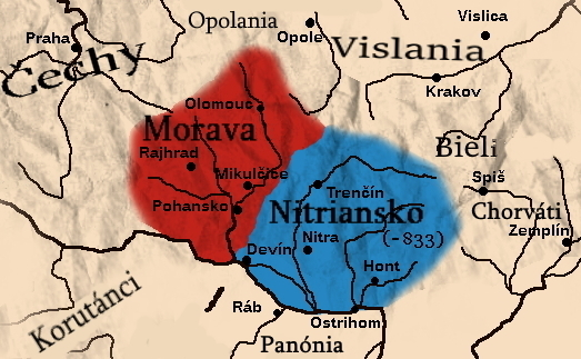 Mapa Nitry a Moravy pred r. 833